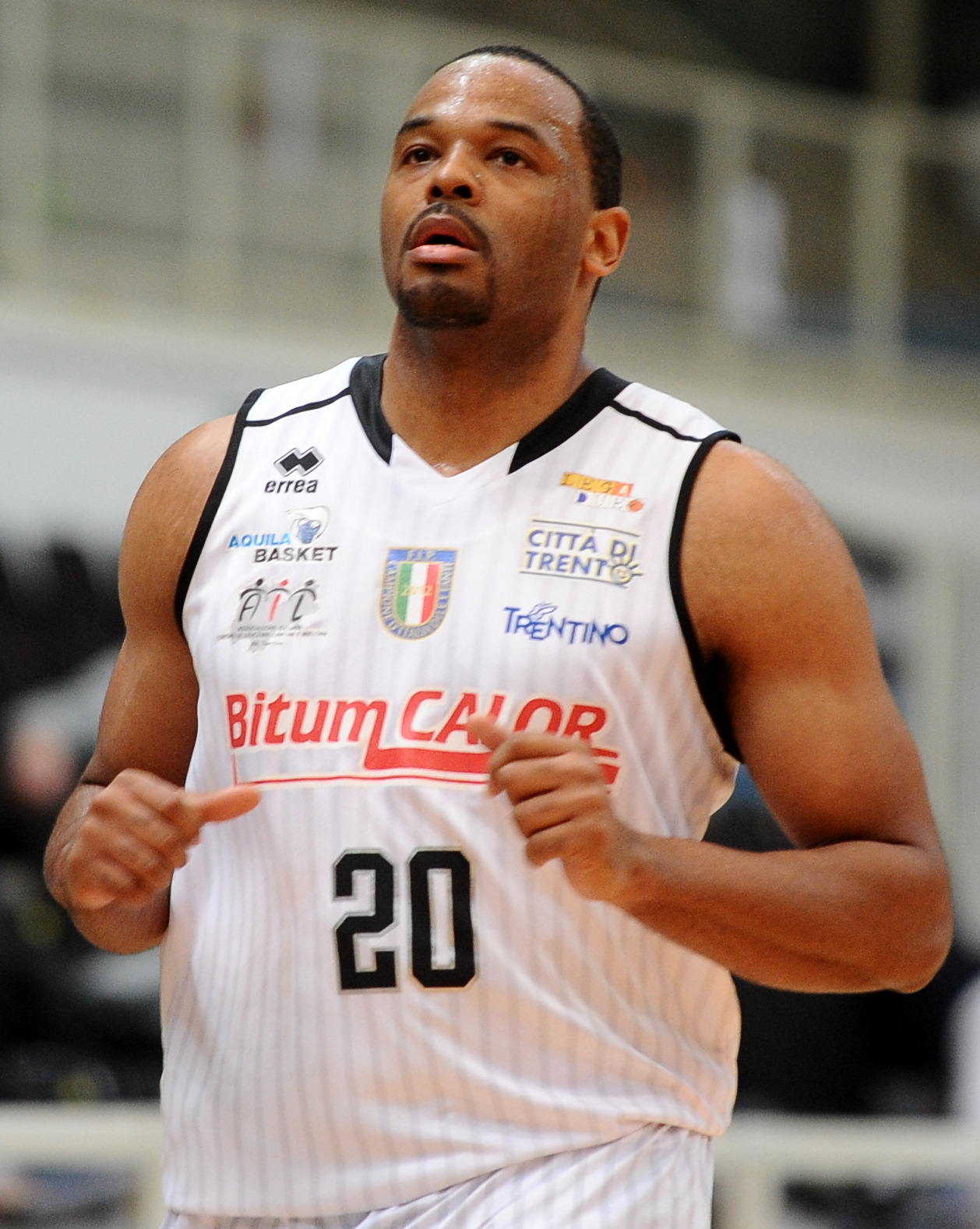 B.J. Elder con la maglia dell'Aquila Basket Trento al PalaTrento in una partita di Legadue contro l'Aurora Basket Jesi.